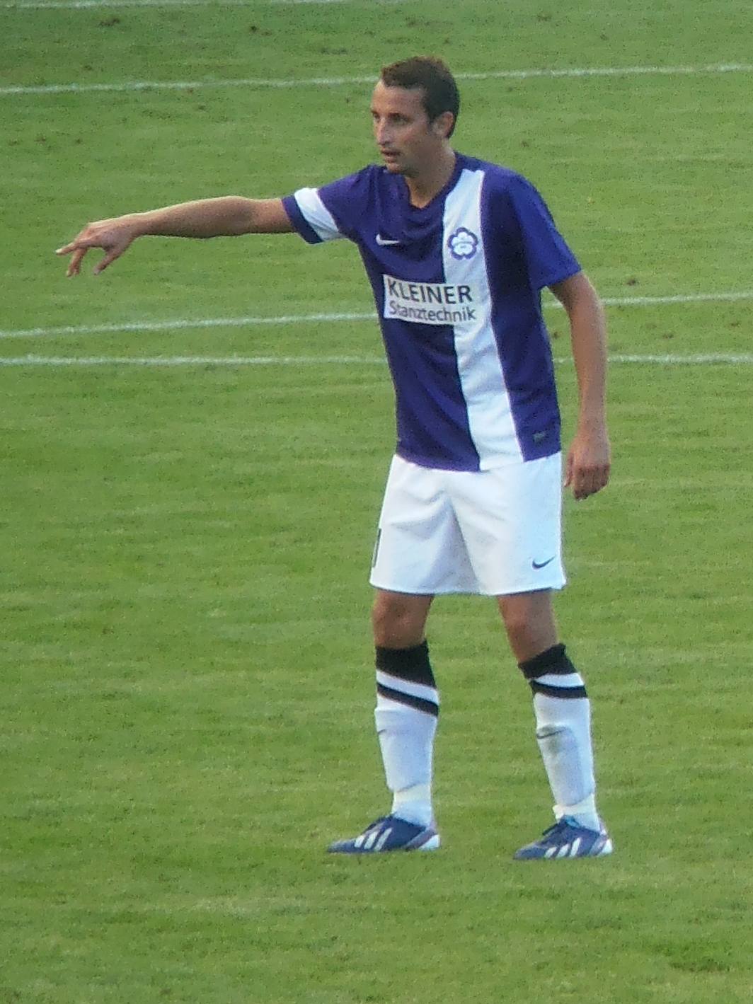 Michael Schürg beim Oberligaspiel des FC Nöttingen gegen den FV Ravensburg